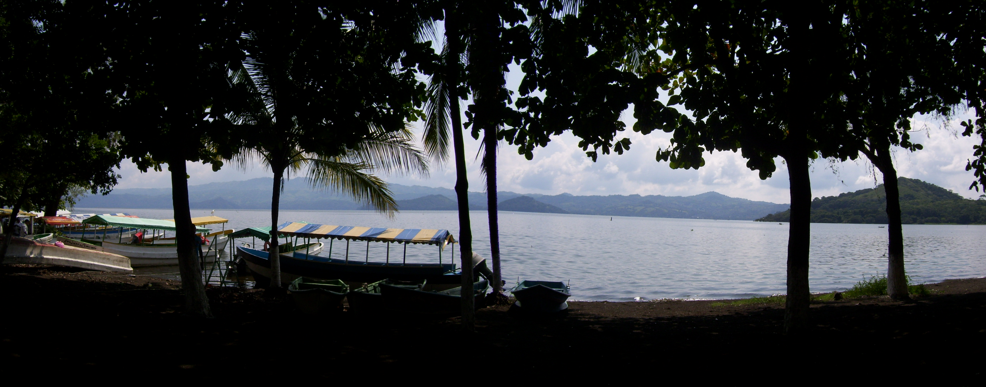 Paisaje de la Laguna de Catemaco, Veracruz